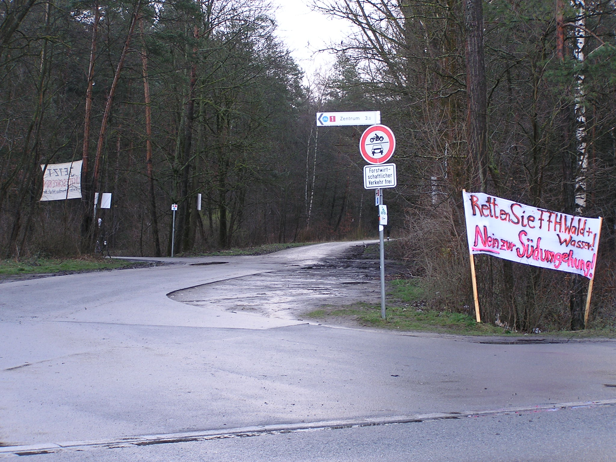 Protest gegen die geplante Erlanger Südumgehung, Sebalder Reichswald – Transparent mit der Auschrift „Retten Sie FFH, Wald + Wasser! Nein zur Südumgehung!“. Im Bild ist auch Zeichen 252 der im März 1971 gültig gewordenen Straßenverkehrs-Ordnung zu sehen. Die Schilder wurden in dieser Ausführung von 1971 bis 1992 hergestellt.